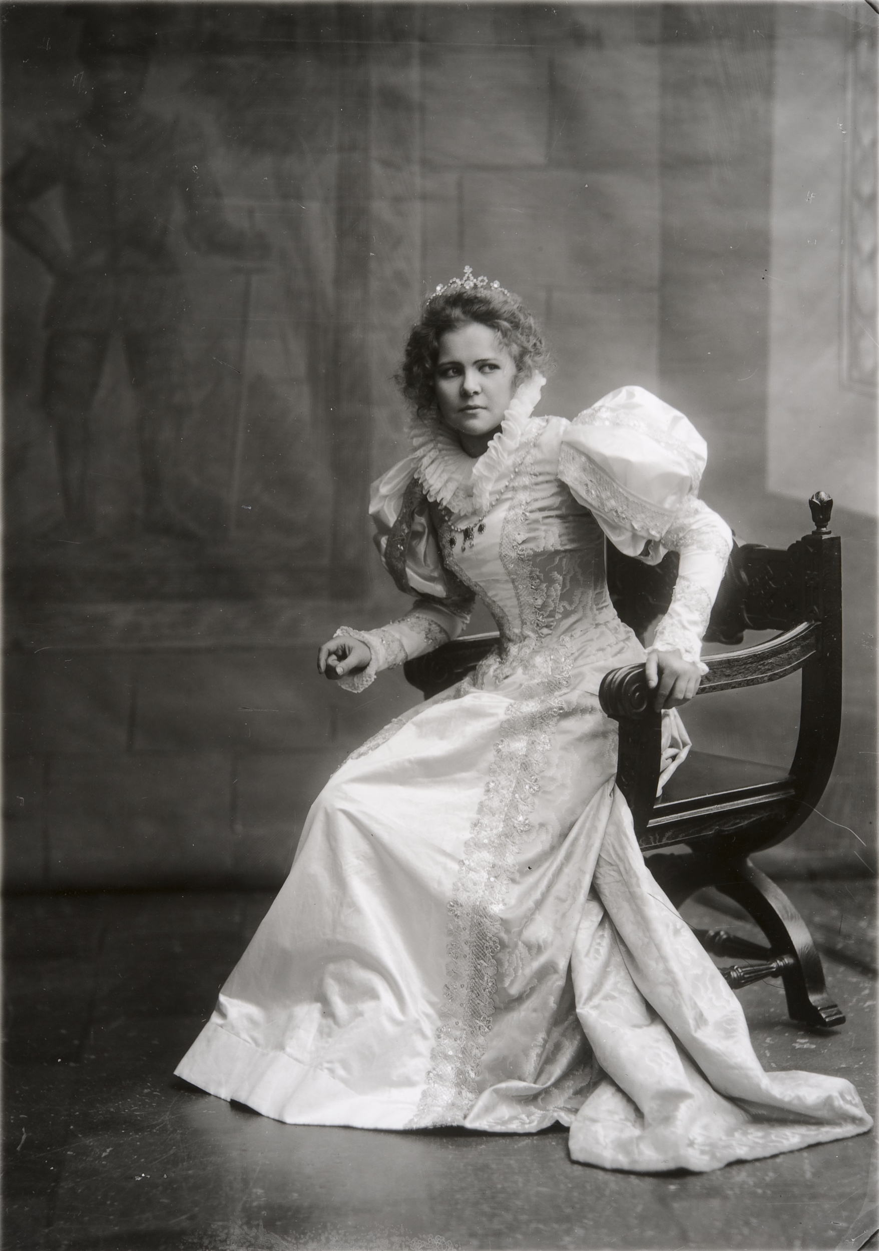 näyttelijä Elli Tompuri; Elli Tompuri pysty, mustavalkoinen